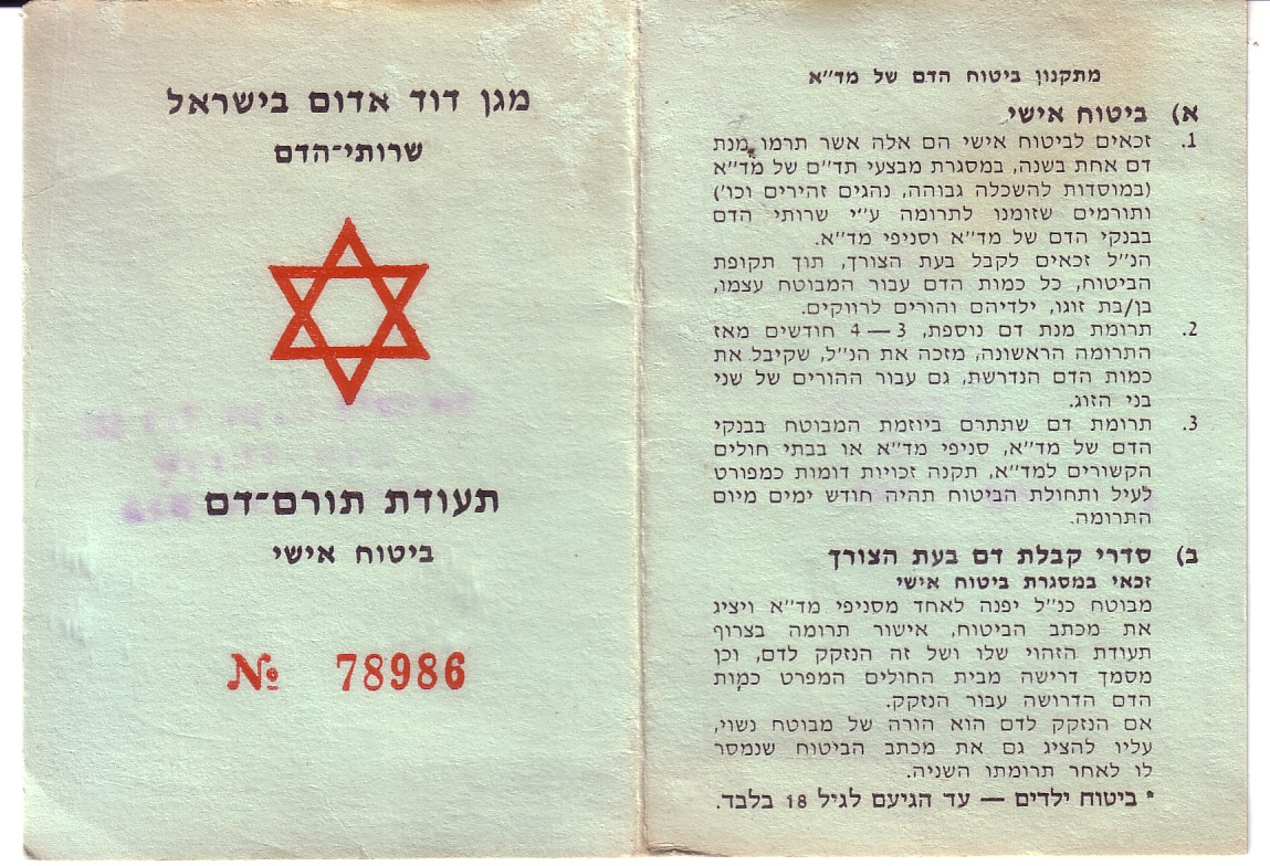 מד"א, תעודת תורם דם, ביטוח אישי